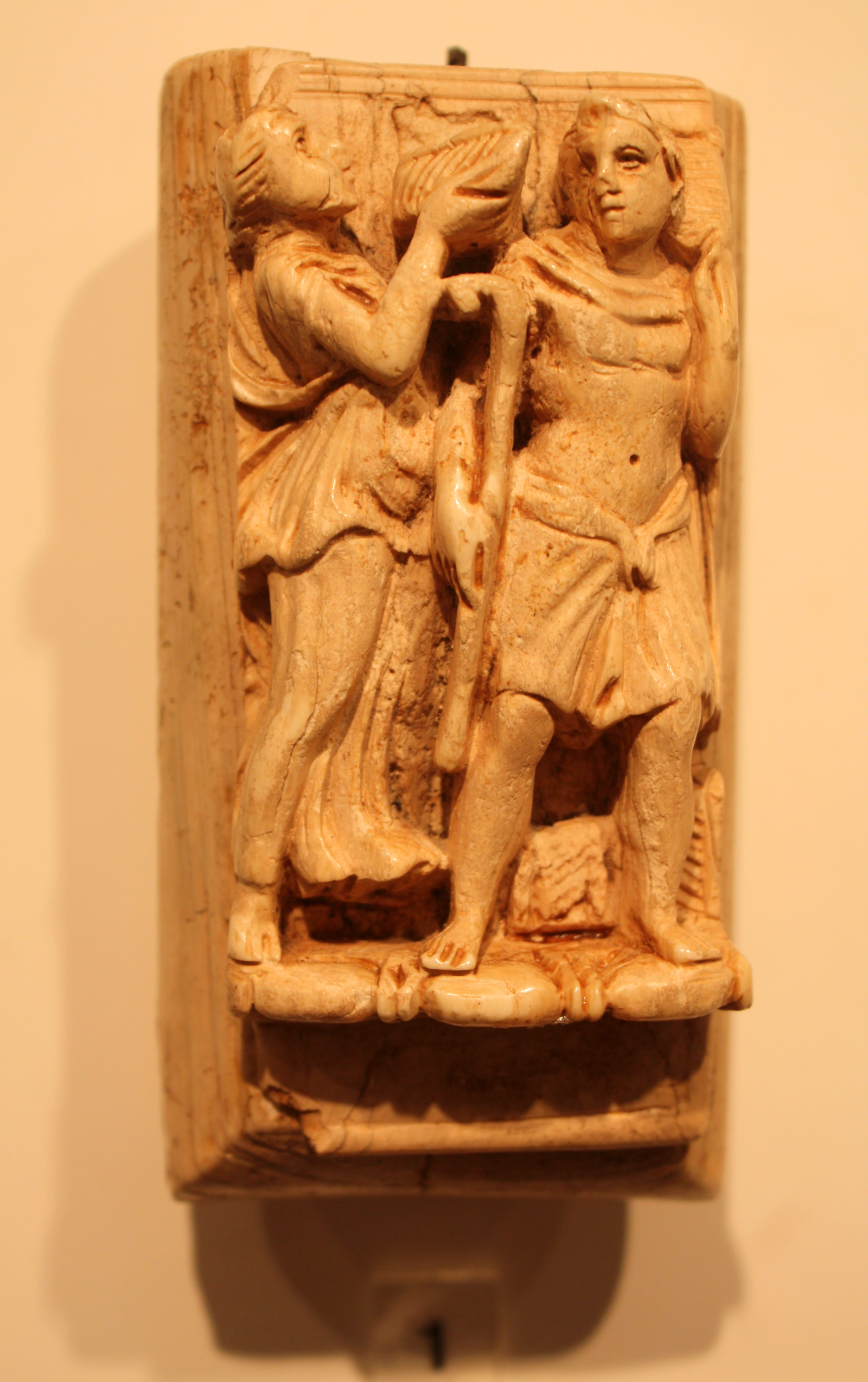 Mäander und Satyr, FO. Köln, bei St. Kunibert. Römischer Elfenbeinschmuck mit einem Motiv des Marsyas-Mythos. Heute RGM Köln